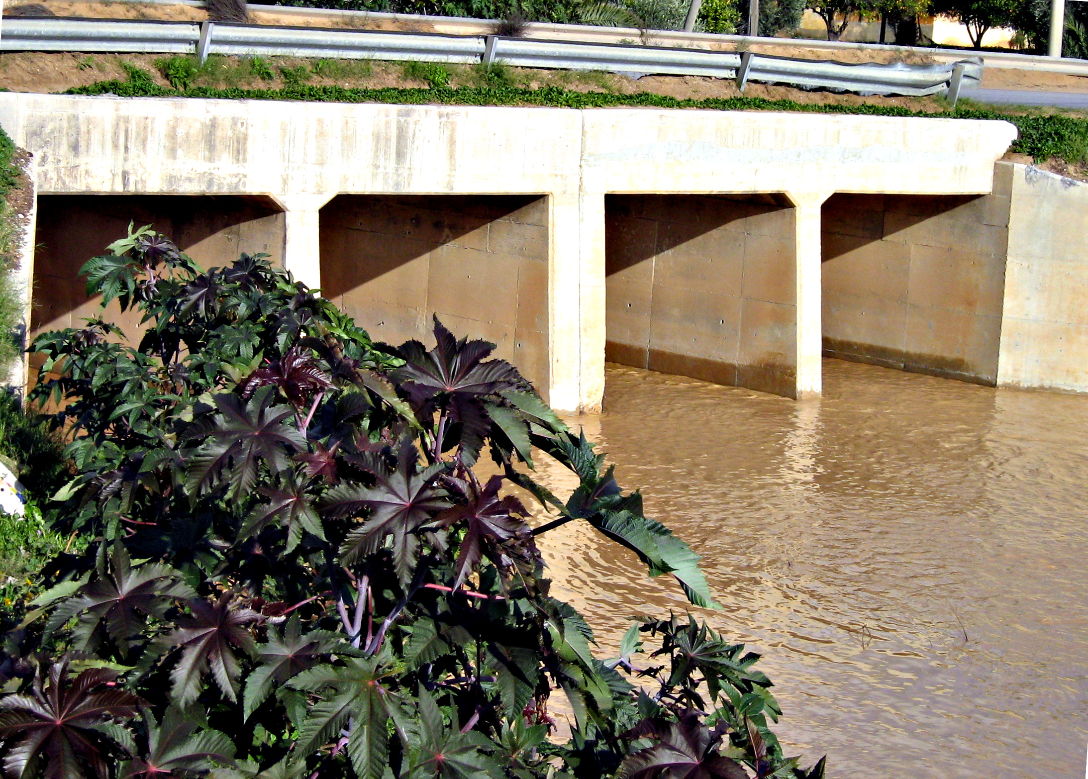 Пересыхающая река в Бенгашире, Ливия.